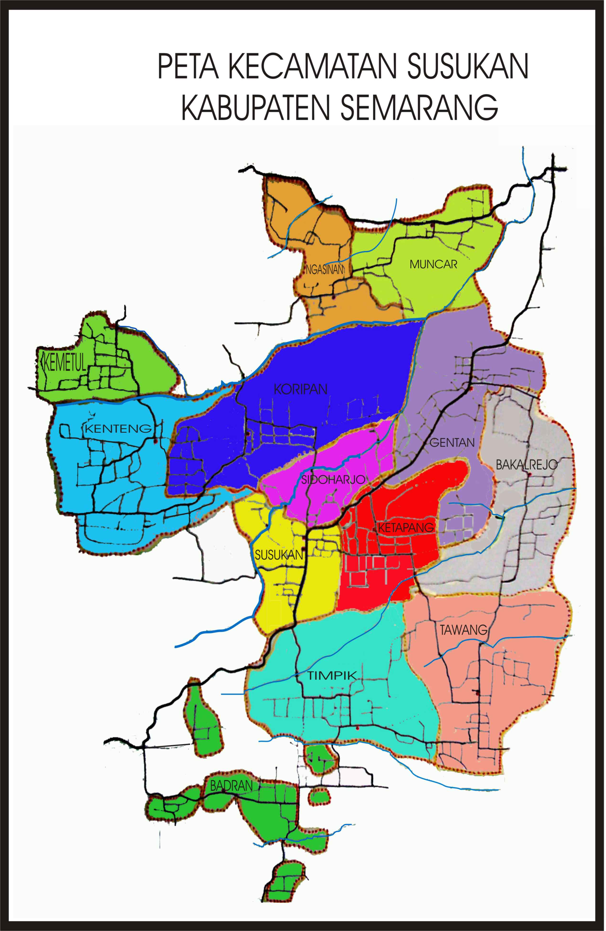 Peta Kecamatan Susukan, Kabupaten Semarang